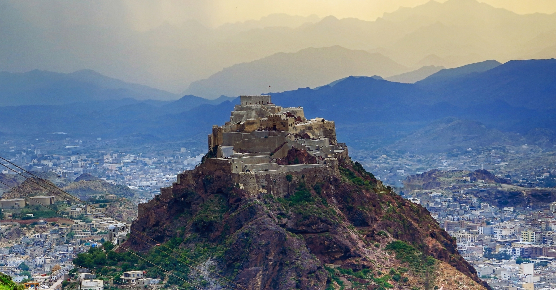 Tai'zz JABAL SABER